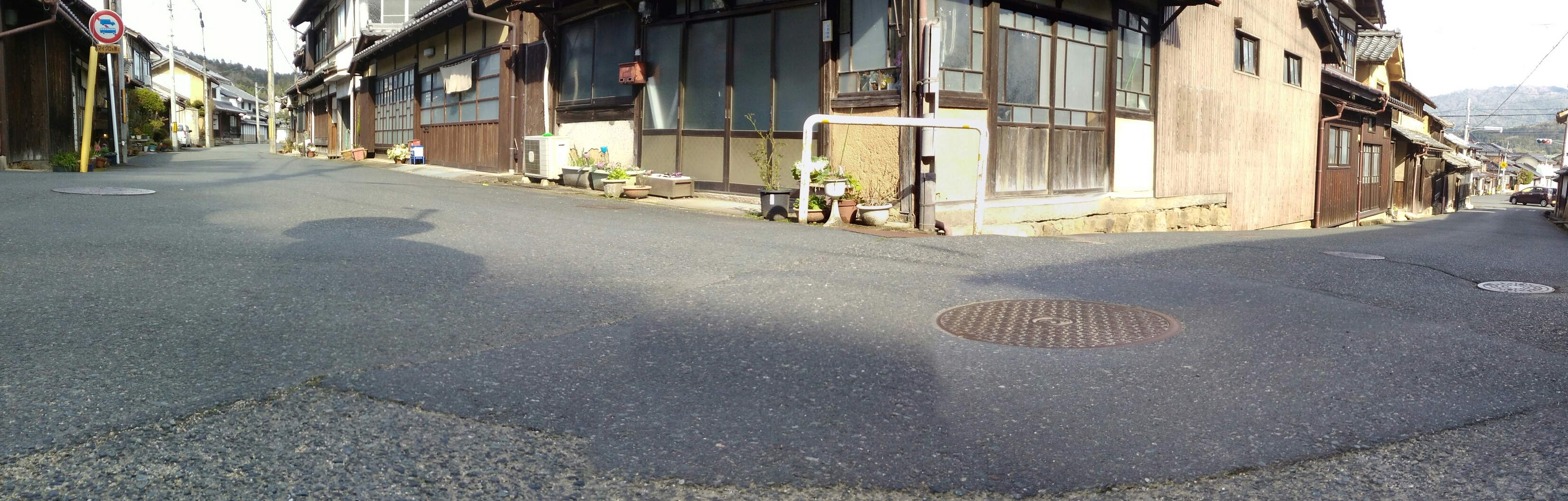 写真左から続いている街道が中央で折れ曲がりさらに写真右奥で折れ曲がり続いている。